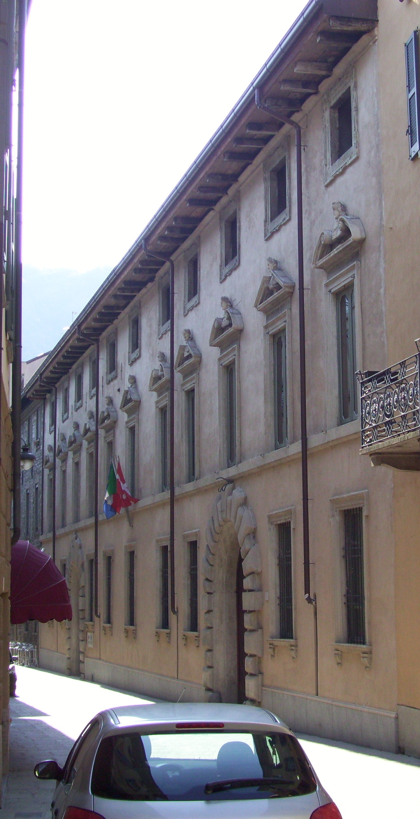 Palazzo Natta, sull'omonima via. Oggi è sede degli uffici delle sedi comasche del Politecnico di Milano e dell'Università dell'Insubria